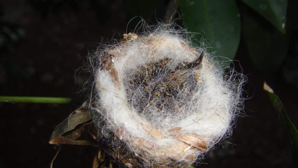 Son dos pichones, pero con la cabeza fuera se puede observar uno